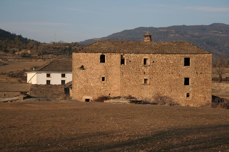 Ordabés